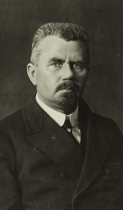 Johan Pitka